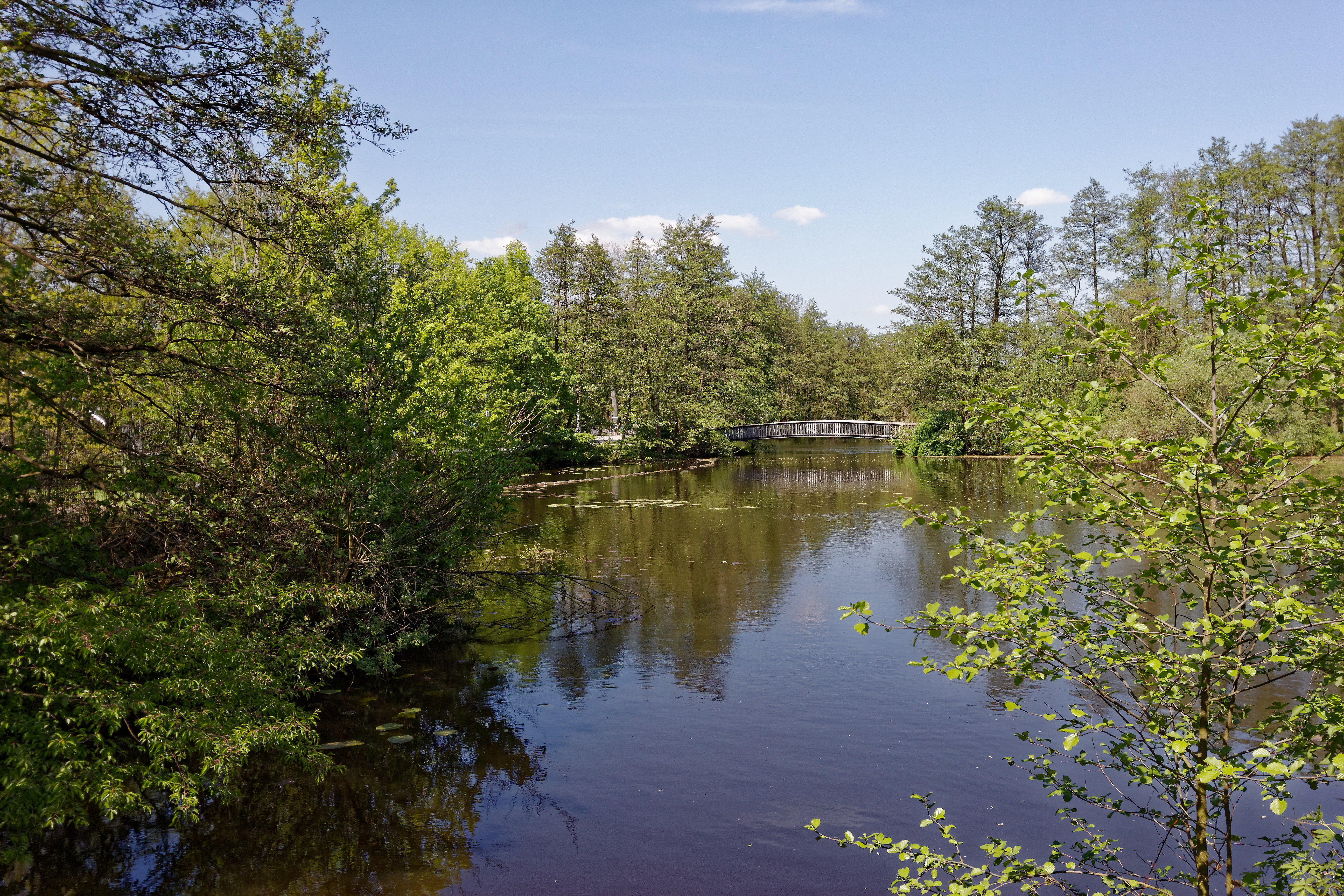 Hamburg-Wilhelmsburg, Inselpark, Eingang Kuckuckshorn, Blick über den See Mahlbusen